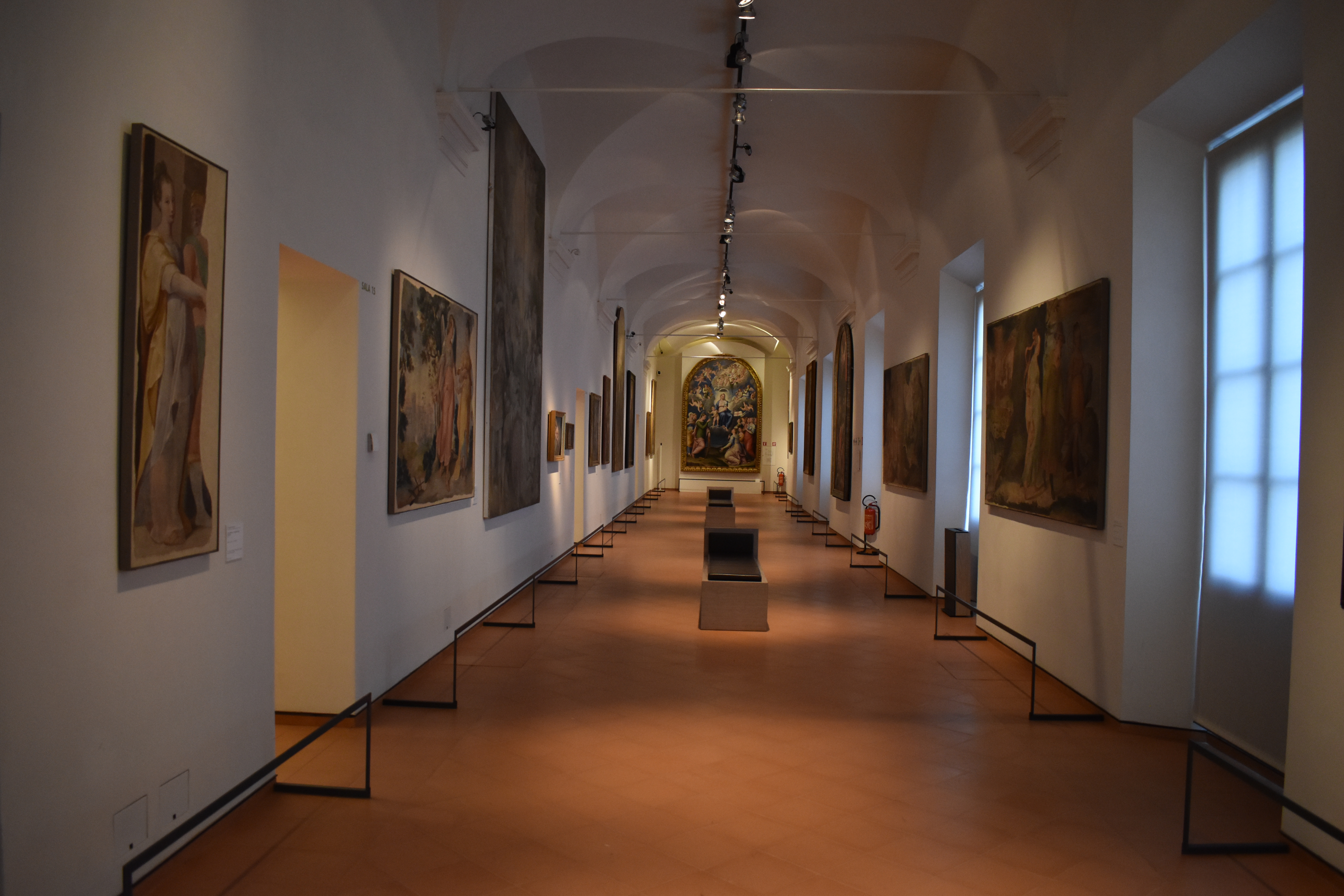 Galleria 19, Pinacoteca Civica Forlì